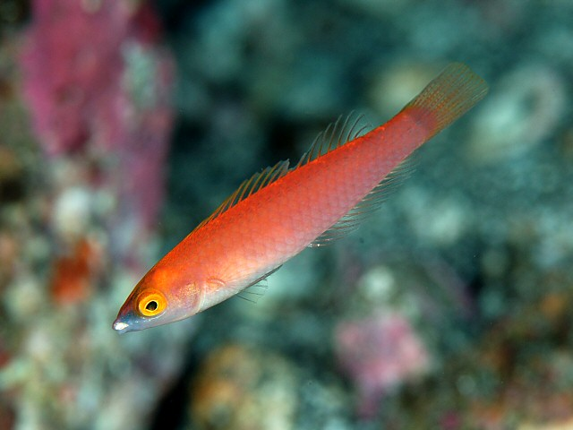 アオスジオグロベラ Pseudojuloides severnsi